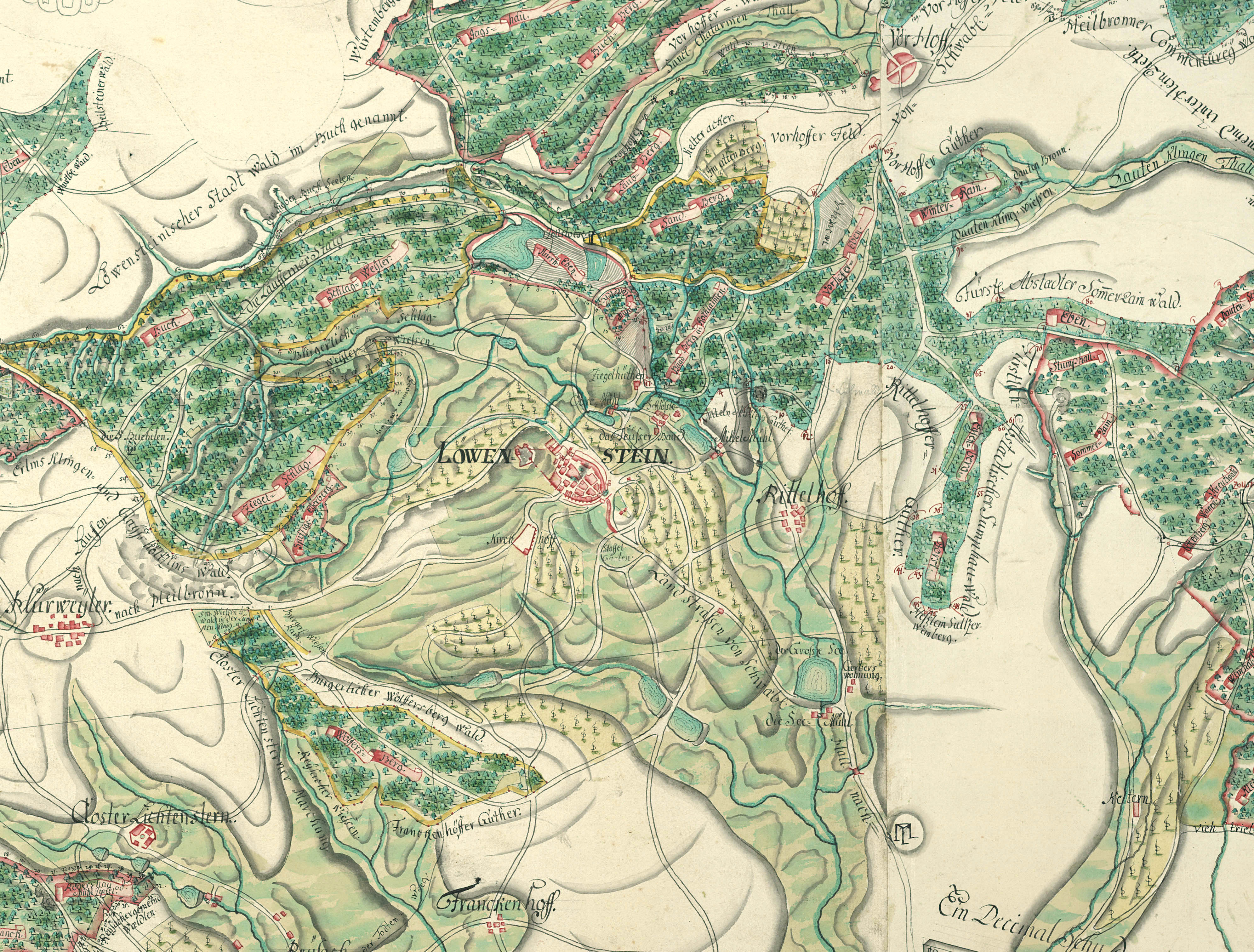 Karte von Löwenstein und Umgebung, entstanden zwischen 1751 und 1759 (StAWt F K 263). Die Karte ist ungefähr gesüdet.